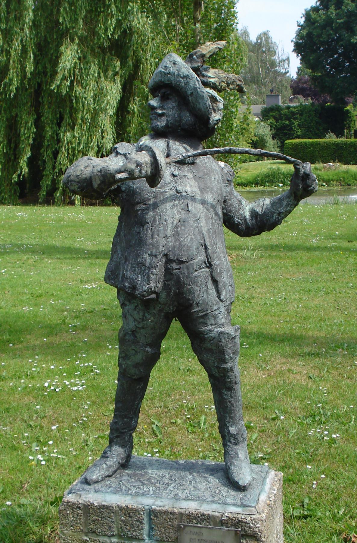 Zwijndrecht, Develweg. Kunstwerk "Cyrano de Bergerac" van Hans Bayens. Zwijndrecht/The Netherlands. FOP.